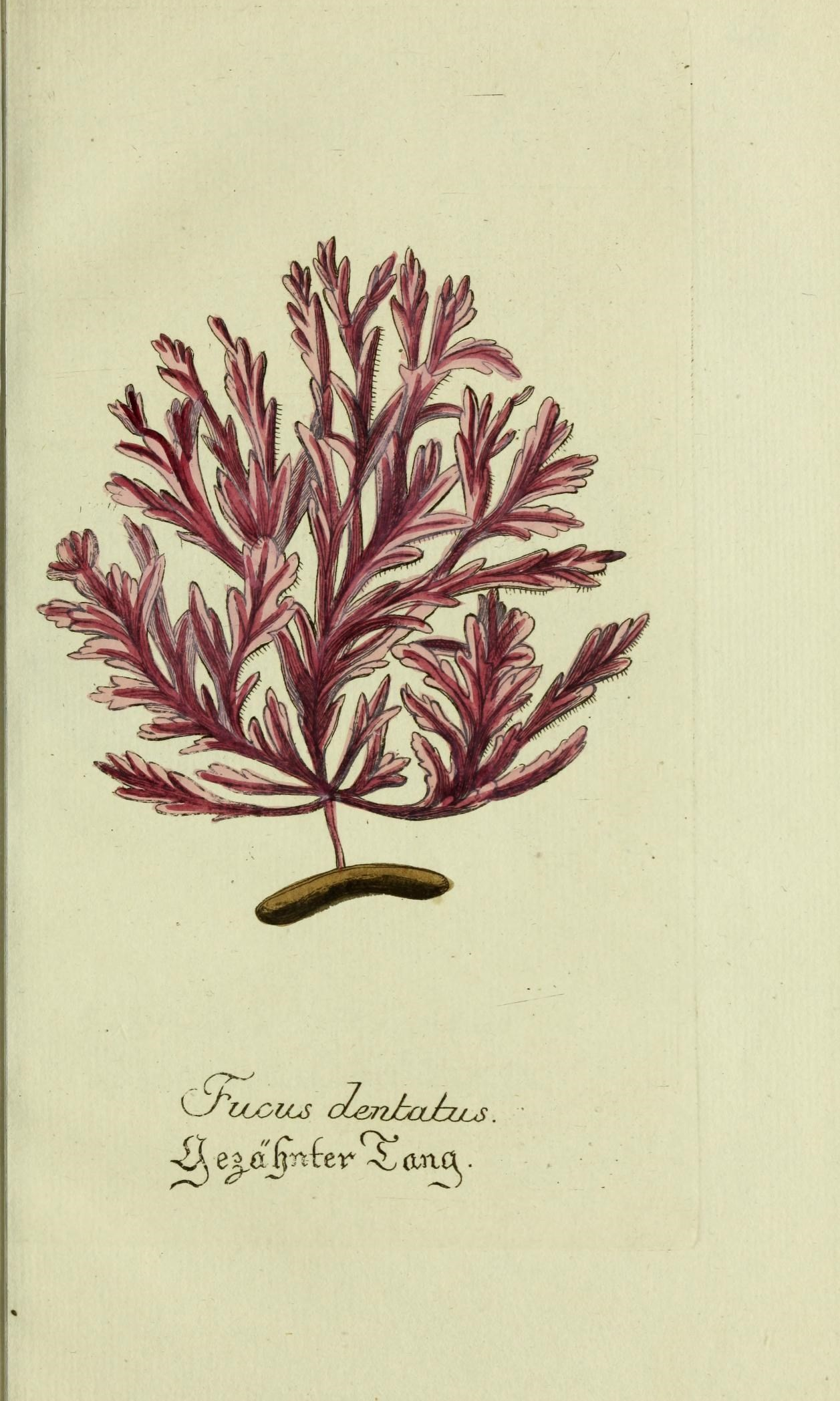 Plantarum indigenarum et exoticarum icones ad vivum coloratae, oder, Sammlung nach der Natur gemalter Abbildungen inn- und ausländlischer Pflanzen, für Liebhaber und Beflissene der Botanik /